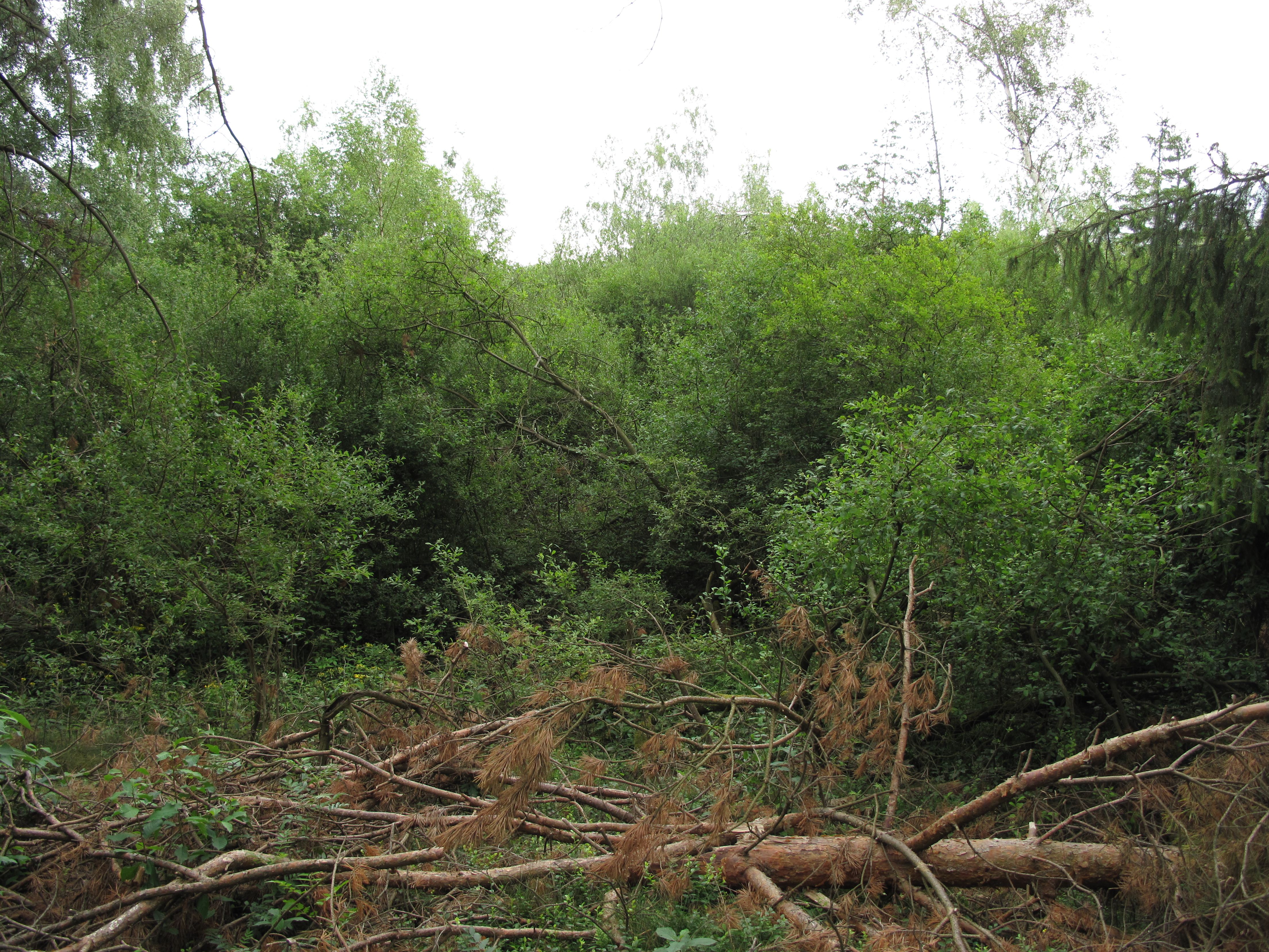 Přírodní rezervace Rašeliniště u Polínek. Okres Plzeň-sever, Česká republika.